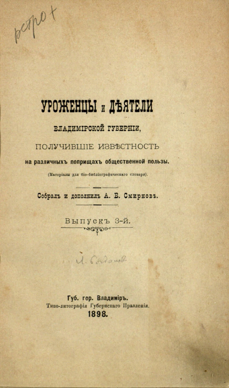 Книга А. В. Смирнова "Уроженцы и деятели Владимирской губернии"